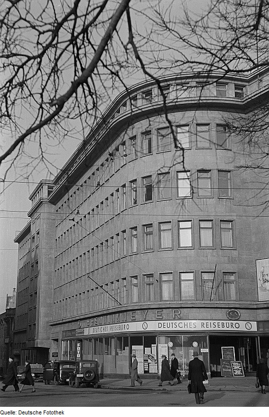 Original image description from the Deutsche FotothekPassanten vor der Hochschule für Binnenhandel